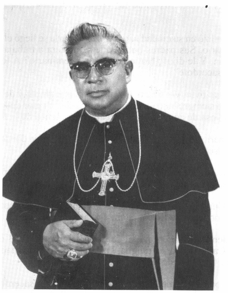 Foto del Sr. Obispo Maclovio Vázquez